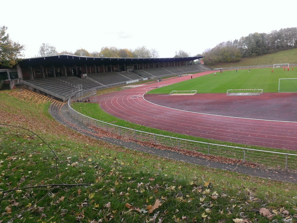 Blick auf die Haupttribüne des Stadion Hohenhorst.